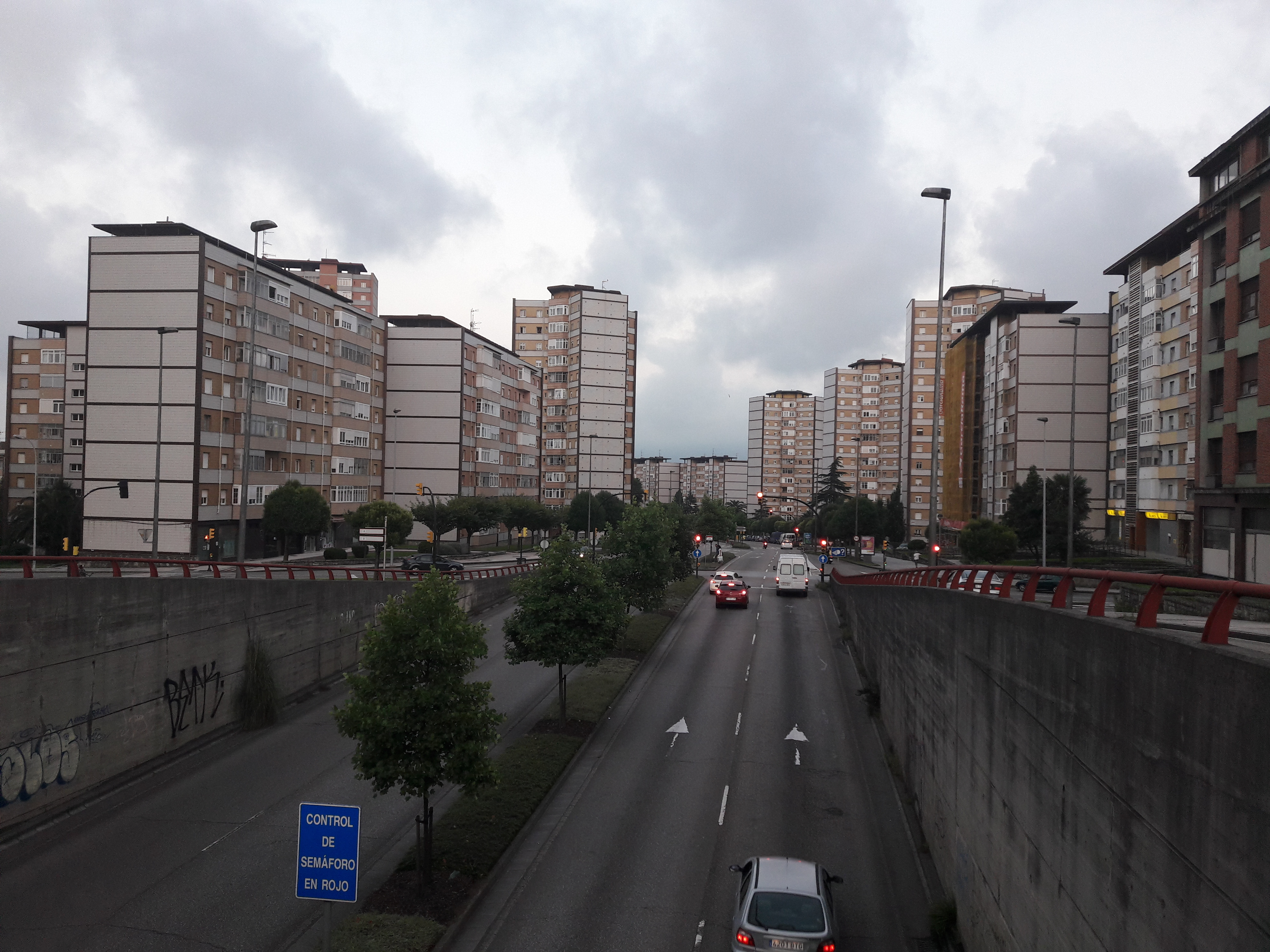 Es una imagen de la zona de Las Mil Quinientas de la ciudad de Gijón desde la Avenida de Gaspar García Laviana